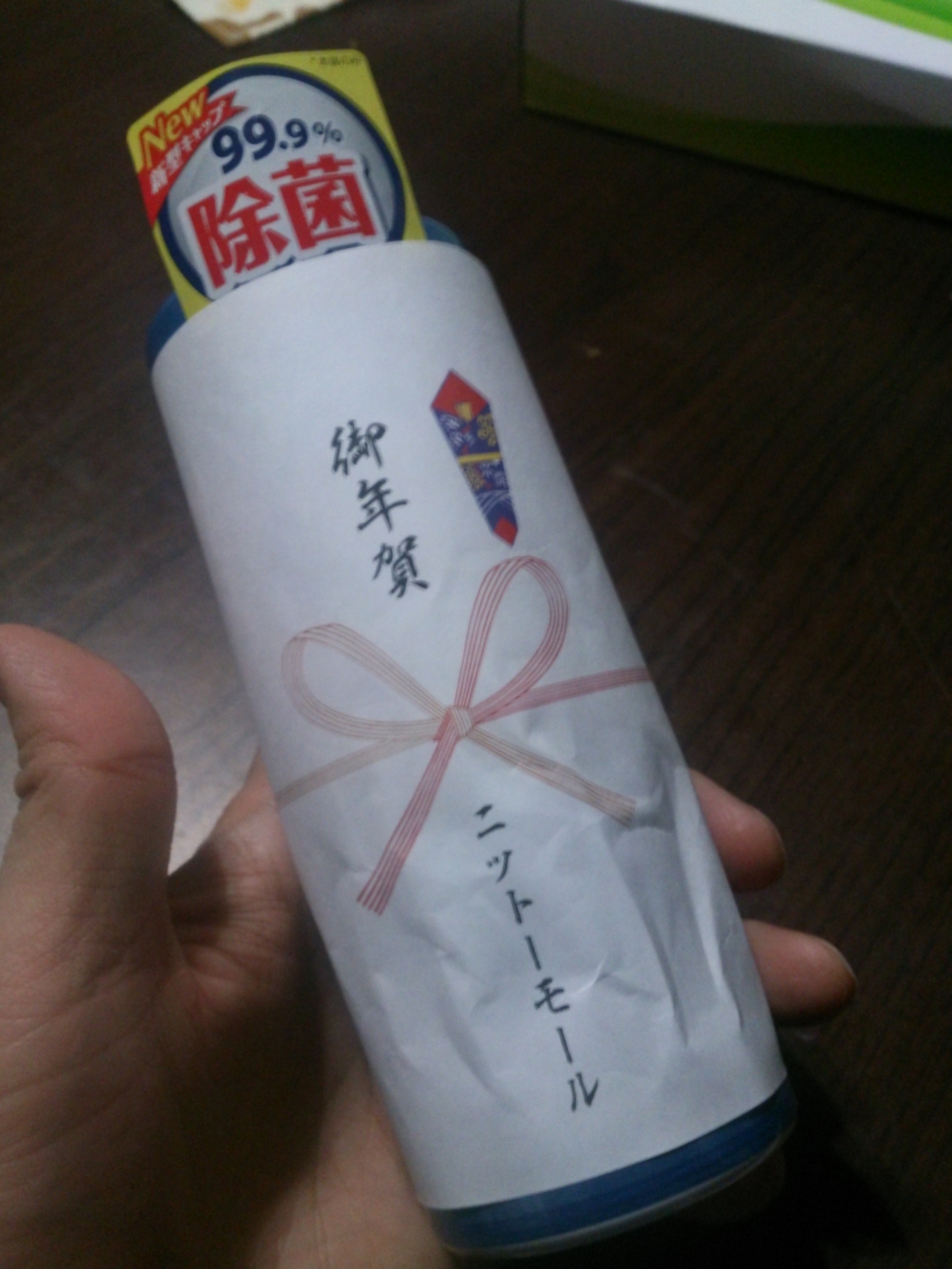 無料で配ってたのかな？ Japanese New Year gift (年賀) by shopping center "NITTOH MALL (ニットーモール)". "除菌ジョイ" by P&G JAPAN [1]